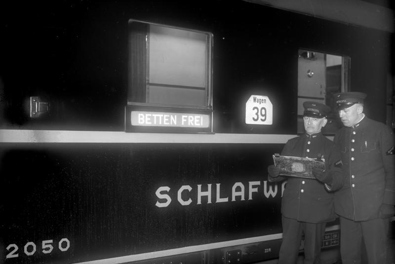 Eine Neuerung bei der deutschen Mitropa-Schlafwagengesellschaft. Betten frei, ein erleuchtetes weithin sichtbares Schild am Schlafwagen, in welchem noch Betten für das Publikum frei sind.